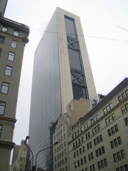 Solow Building (photo personnel 2005)